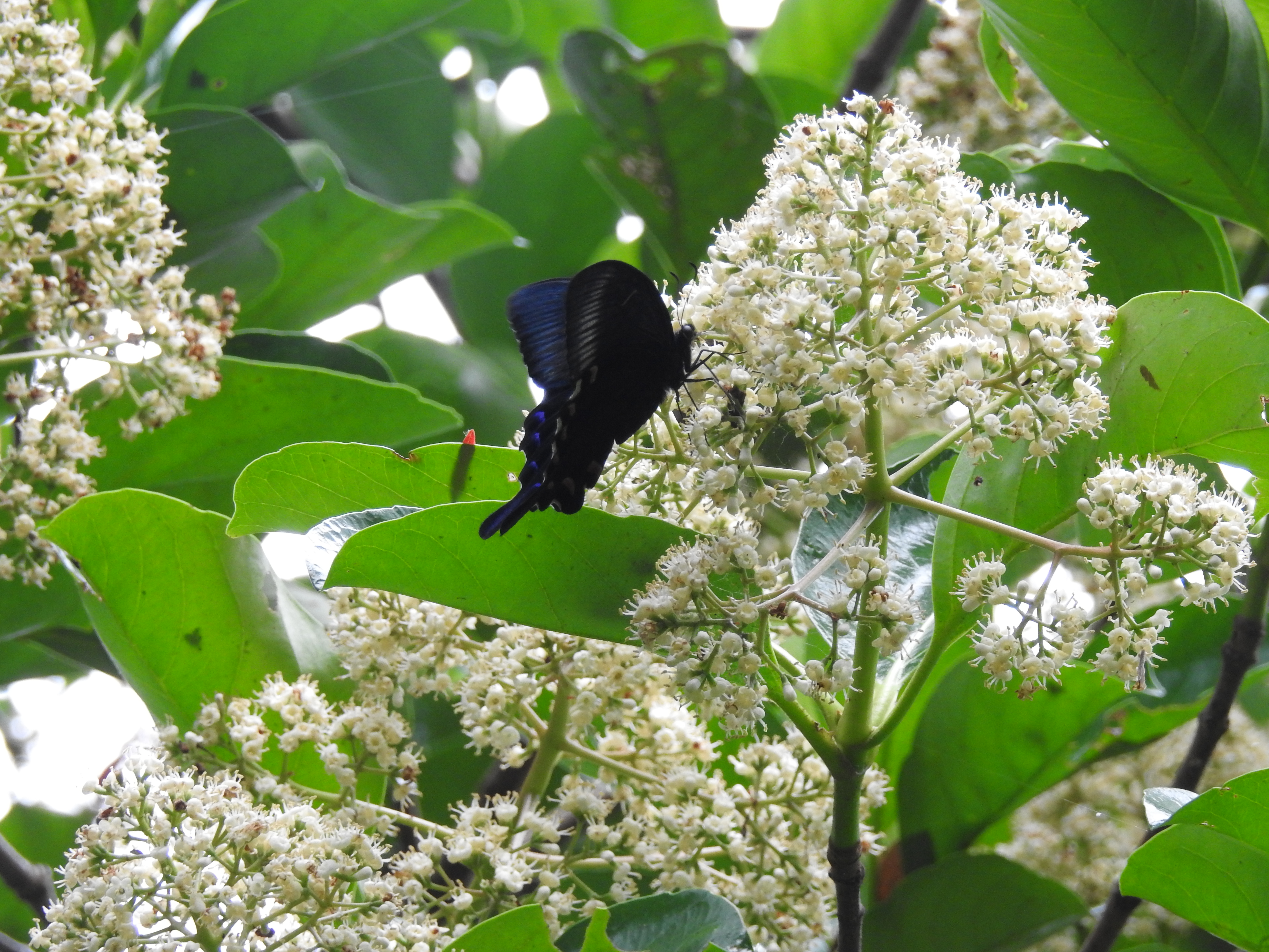 沖縄県大宜味村イギミハキンゾー展望台付近で撮影したオキナワカラスアゲハです。